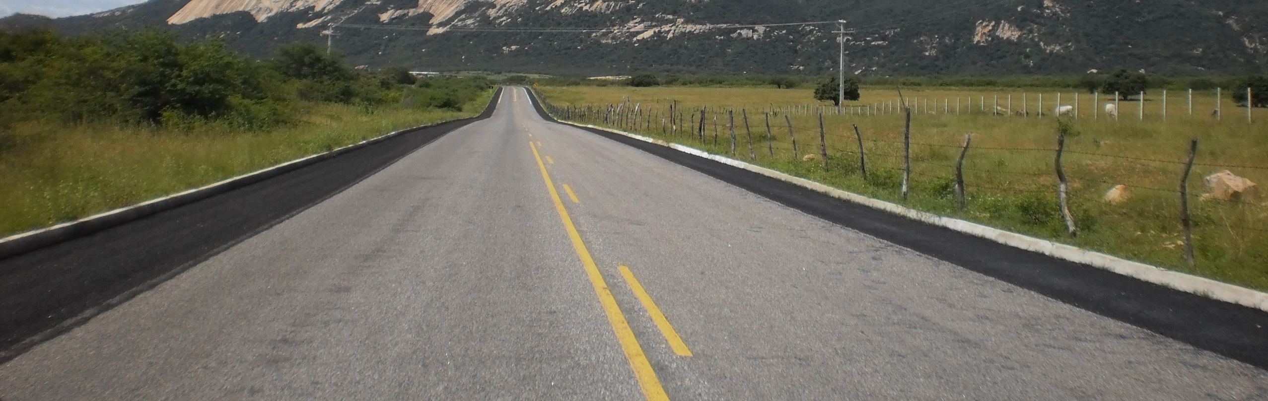 BR-226 próximo de Patu - Rio Grande do Norte, Brasil.